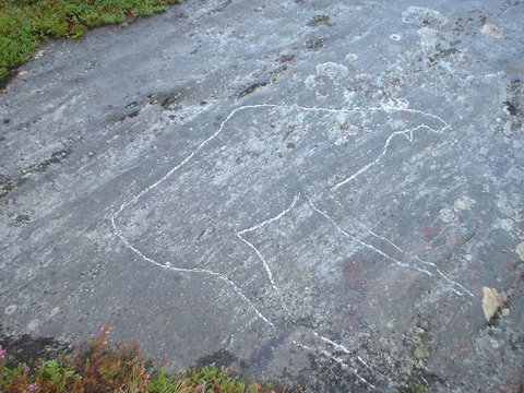 Helleristninger, Slettjord i Herjangen.